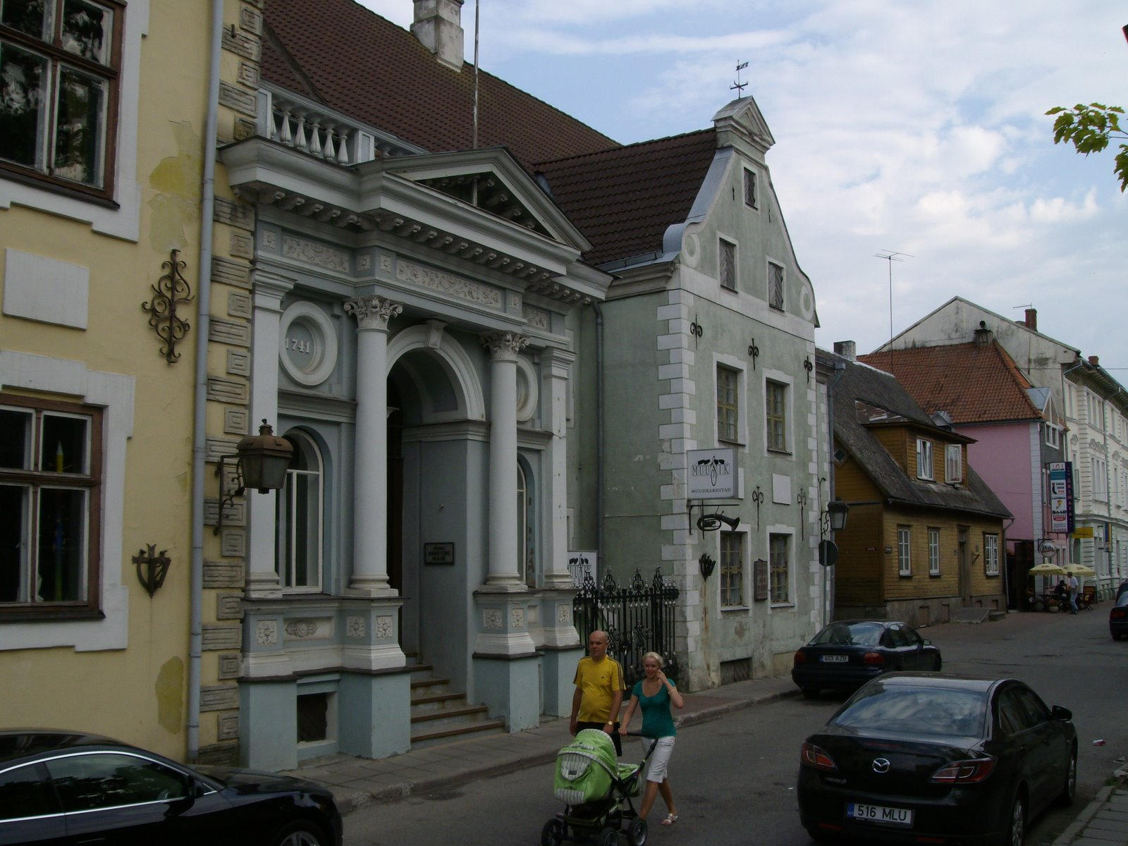 Elamu Pärnus Pühavaimu tn 8